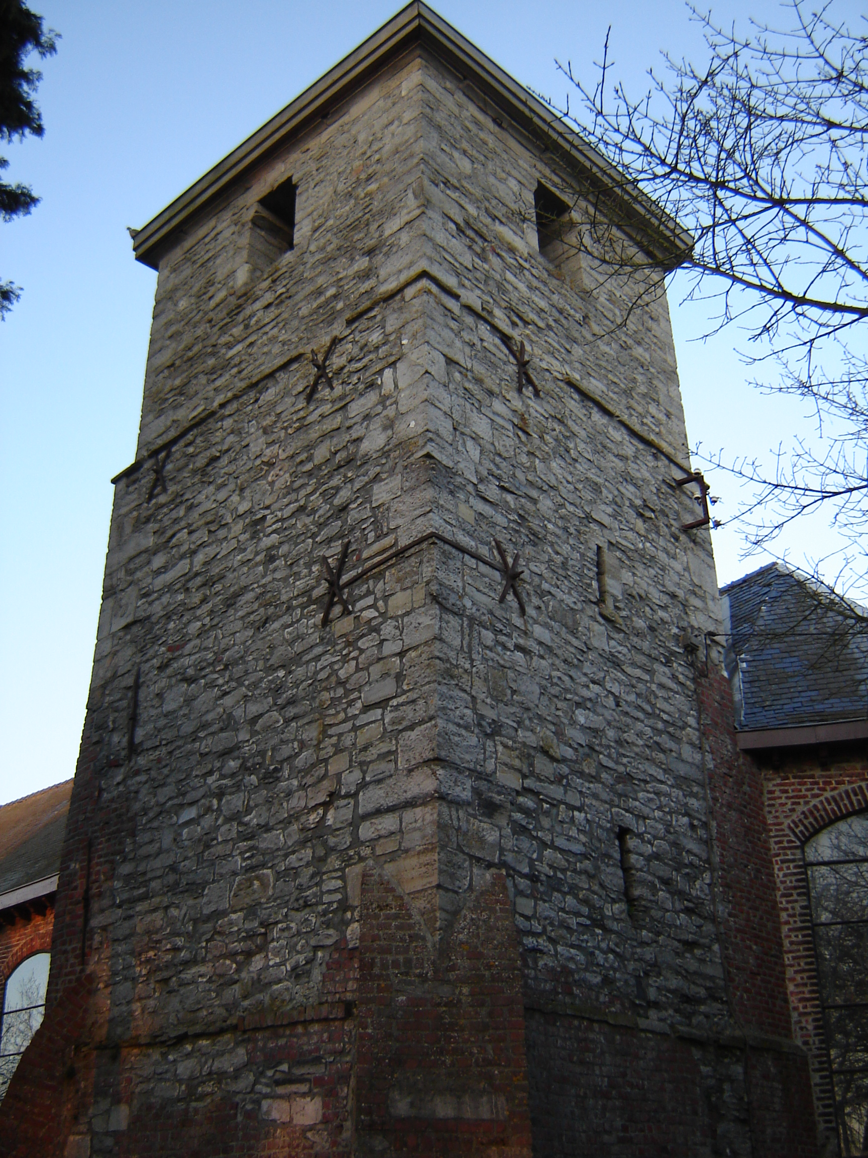 Eglise Saint-Amand in Lamain, Tournai, Hainaut, Belgium